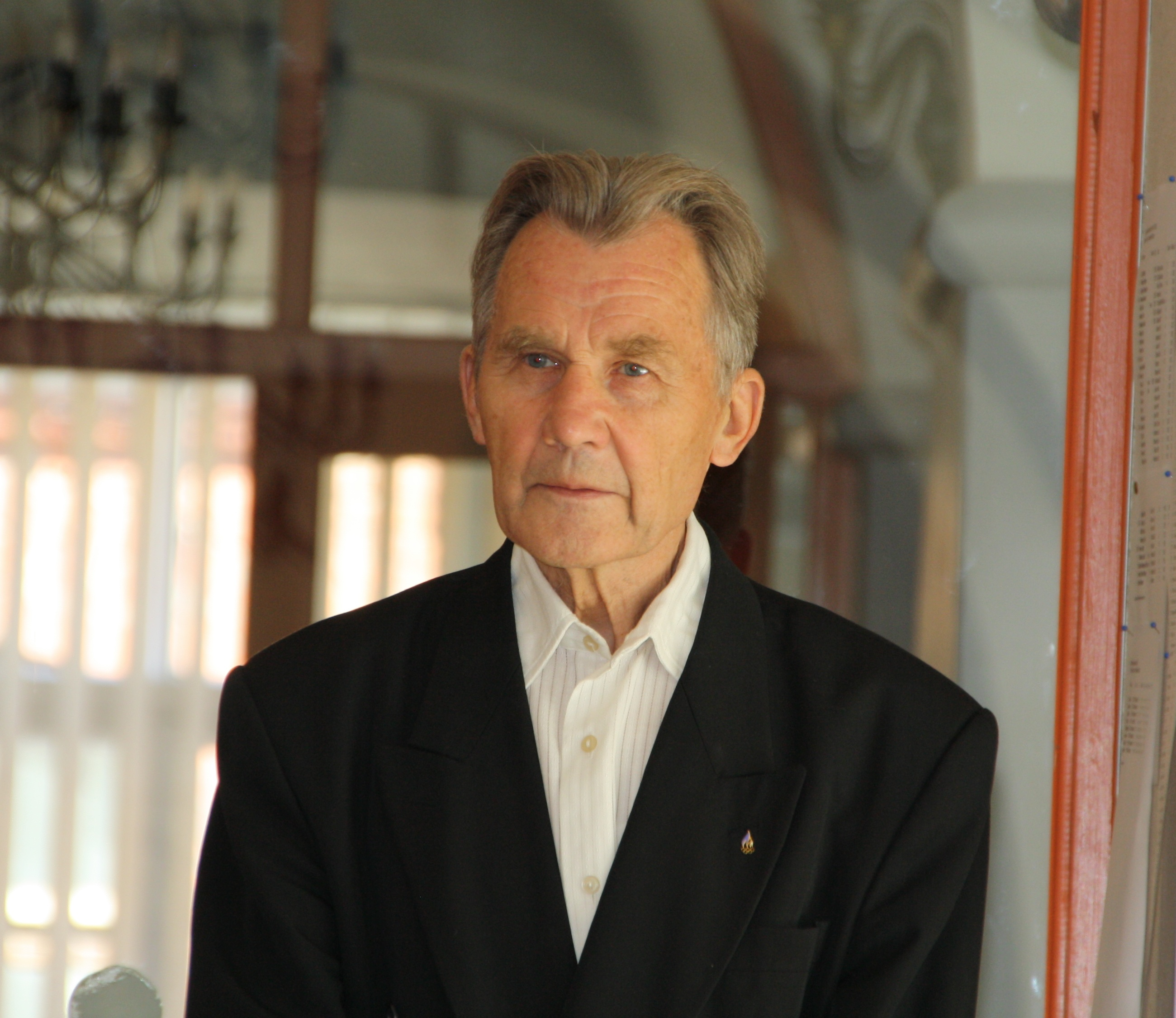 Lembit Vahesaar rahvusvahelise kabeturniiri Tallinn-2009 lõpetamisel.